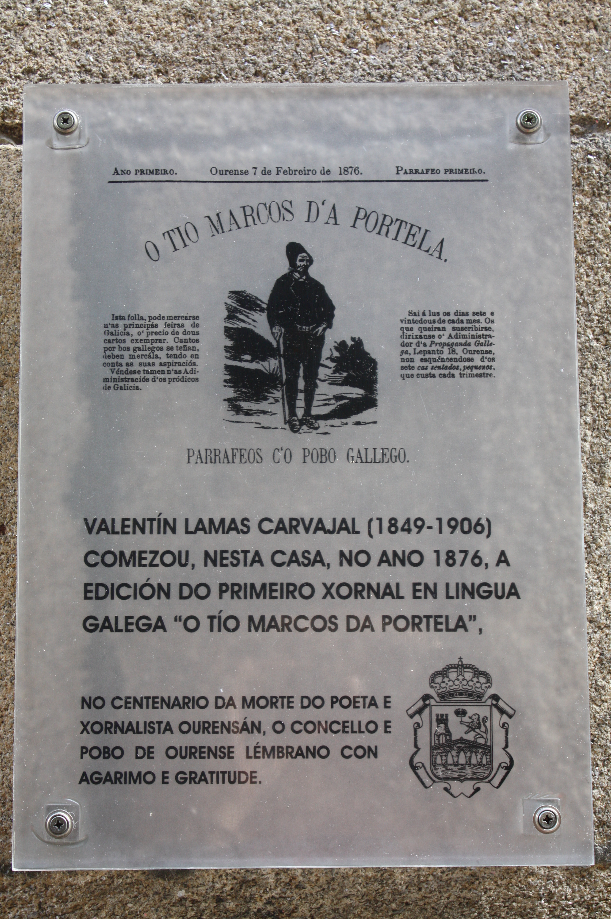 Placa colocada na casa onde se comezou a imprentar en 1876 "O Tio Marcos d'a Portela", o primeiro xornal en lingua galega. Está situada na rúa Lepanto, 18, de Ourense.